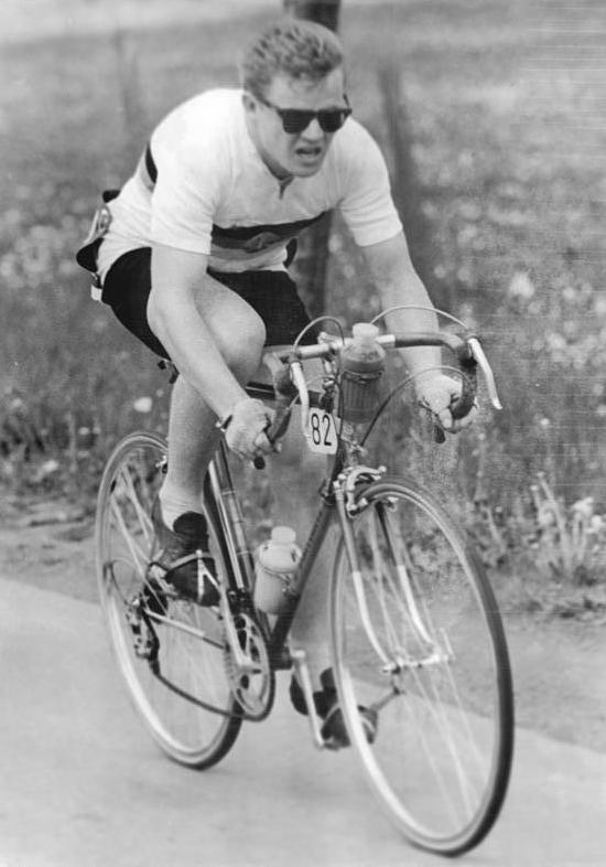 Erich Hagen Zentralbild Trä-Hr 9.5.1961 XIV. Internationale Friedensfahrt Warschau -Berlin Prag 1961. 7. Etappe von Rostock nach Berlin am 9.5.61. UBz: Erich Hagen auf der Strecke.